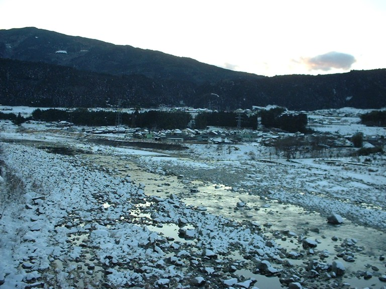 木曽川中流 かつて「県境」だった河原 岐阜県ja:中津川市 弥栄橋上から 撮影当時は、手前が長野県木曽郡山口村、対岸が岐阜県恵那郡坂下町